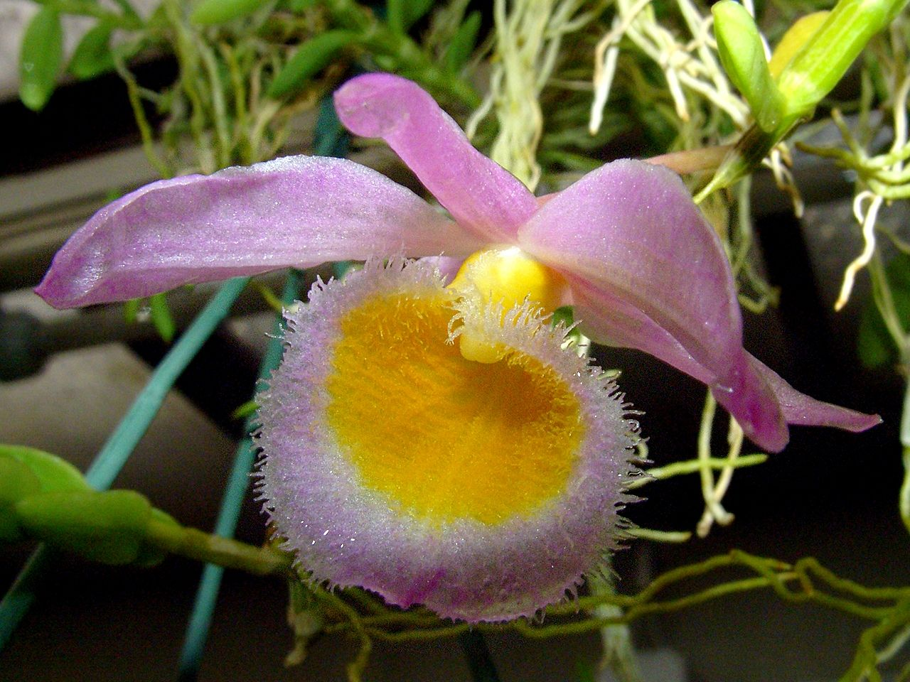 Dendrobium loddigesii - flower